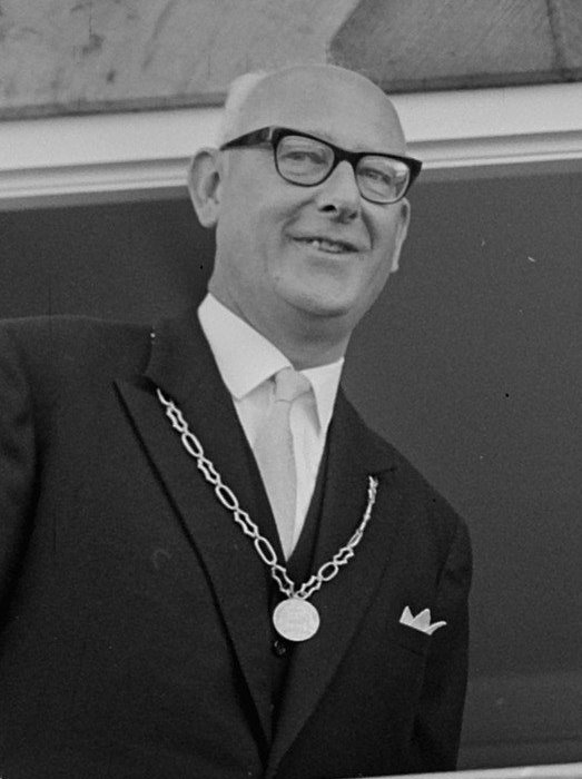 Collectie / Archief : Fotocollectie Anefo Reportage / Serie : Koningin Juliana bezoekt de Deltawerken Beschrijving : Koningin Juliana wuift op het bordes van het raadhuis te Numansdorp naar het volk; links burgemeester S.W. Henry Datum : 1 september 1964 Locatie : Numansdorp, Zuid-Holland Trefwoorden : burgemeesters, koninginnen Persoonsnaam : Henry, S.W., Juliana (koningin Nederland) Instellingsnaam : Rijkswaterstaat Fotograaf : Koch, Eric / Anefo, [onbekend] Auteursrechthebbende : Nationaal Archief Materiaalsoort : Negatief (zwart/wit) Nummer archiefinventaris : bekijk toegang 2.24.01.03 Bestanddeelnummer : 916-8331